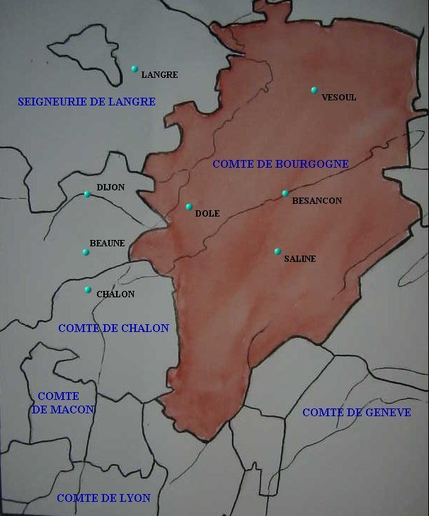 Comté de Bourgogne Féodale approximatif (actuelle Franche Comté)